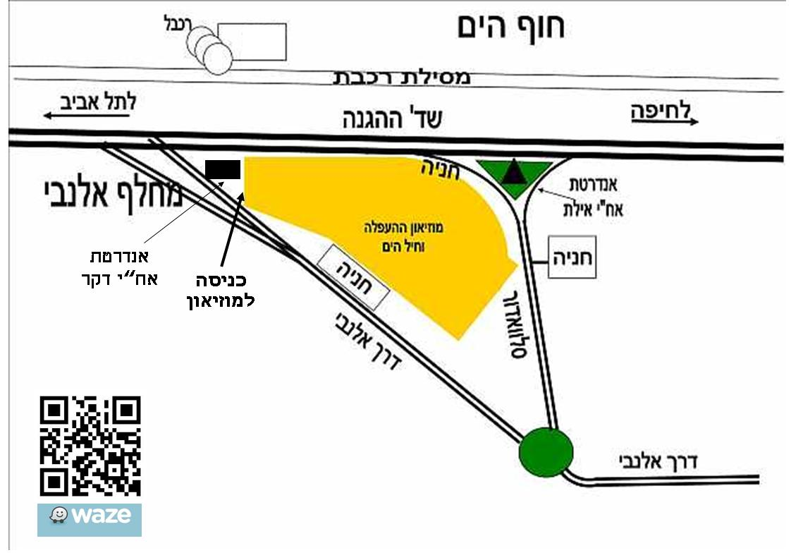 מפת אזור מוזיאון ההעפלה וחיל הים